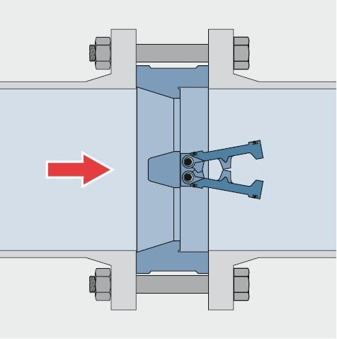 Принцип действия двухстворчатого пружинного клапана